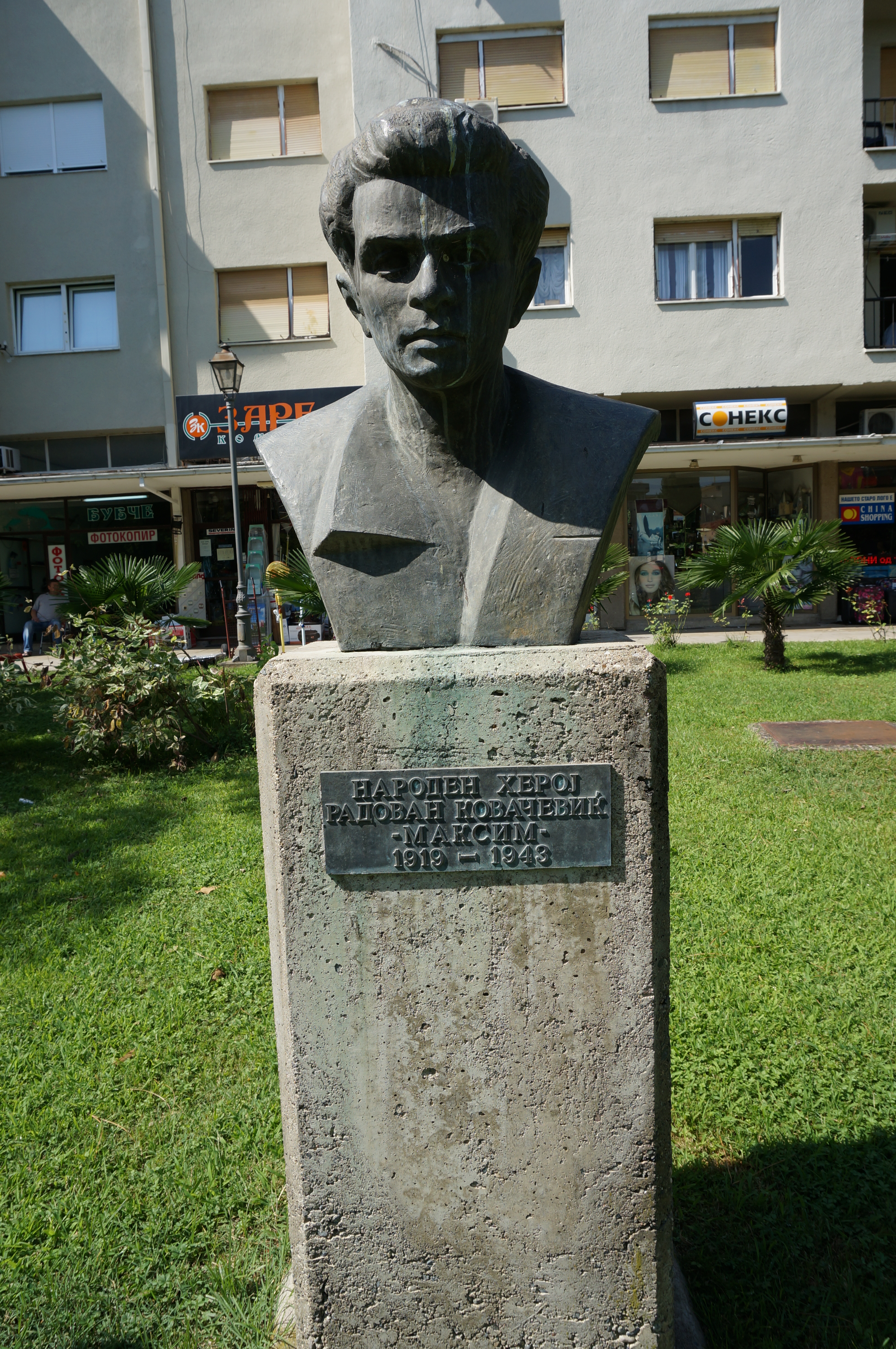 monument à Guevgueli.